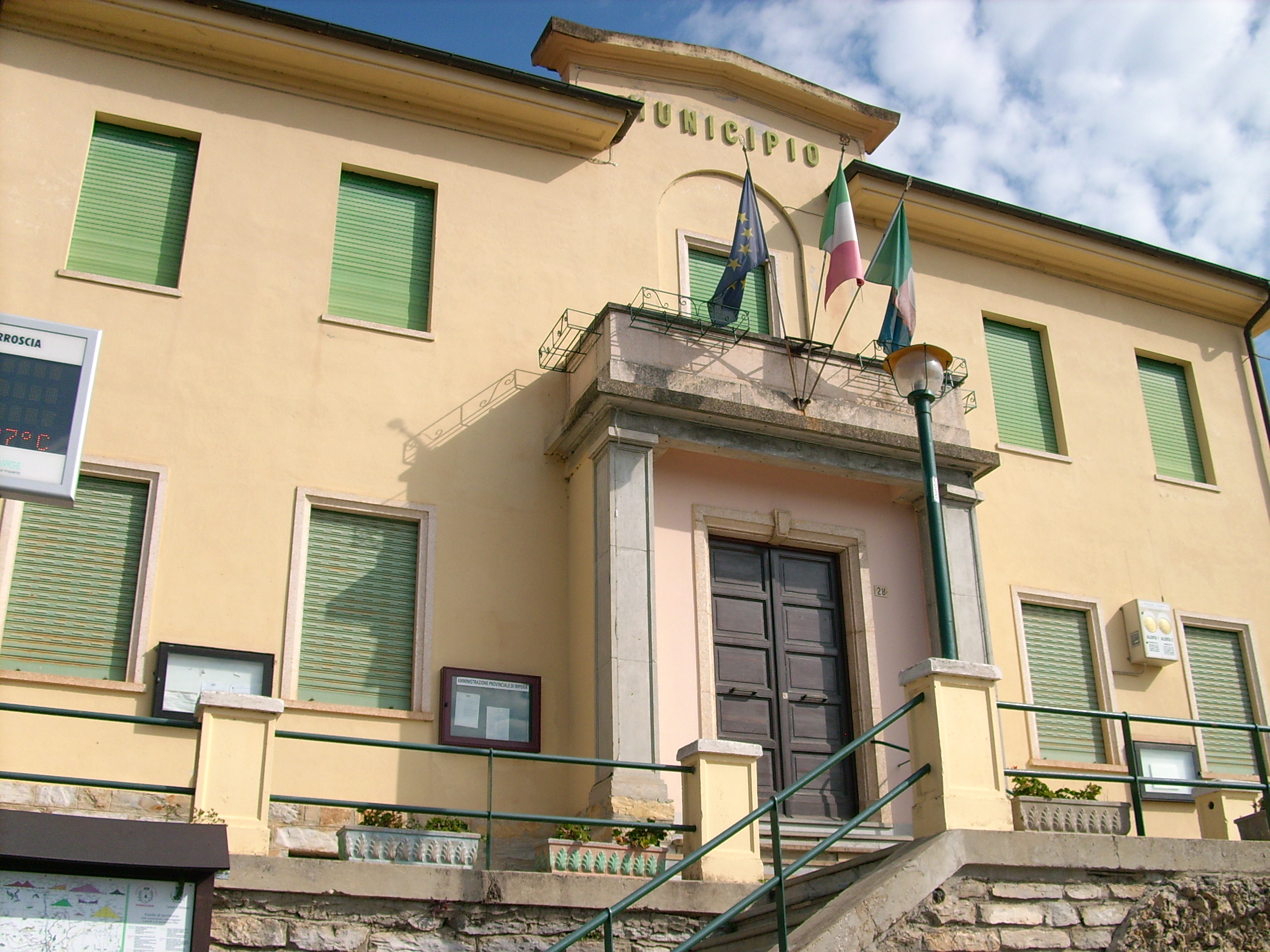 Municipio di Pornassio, Liguria, Italia